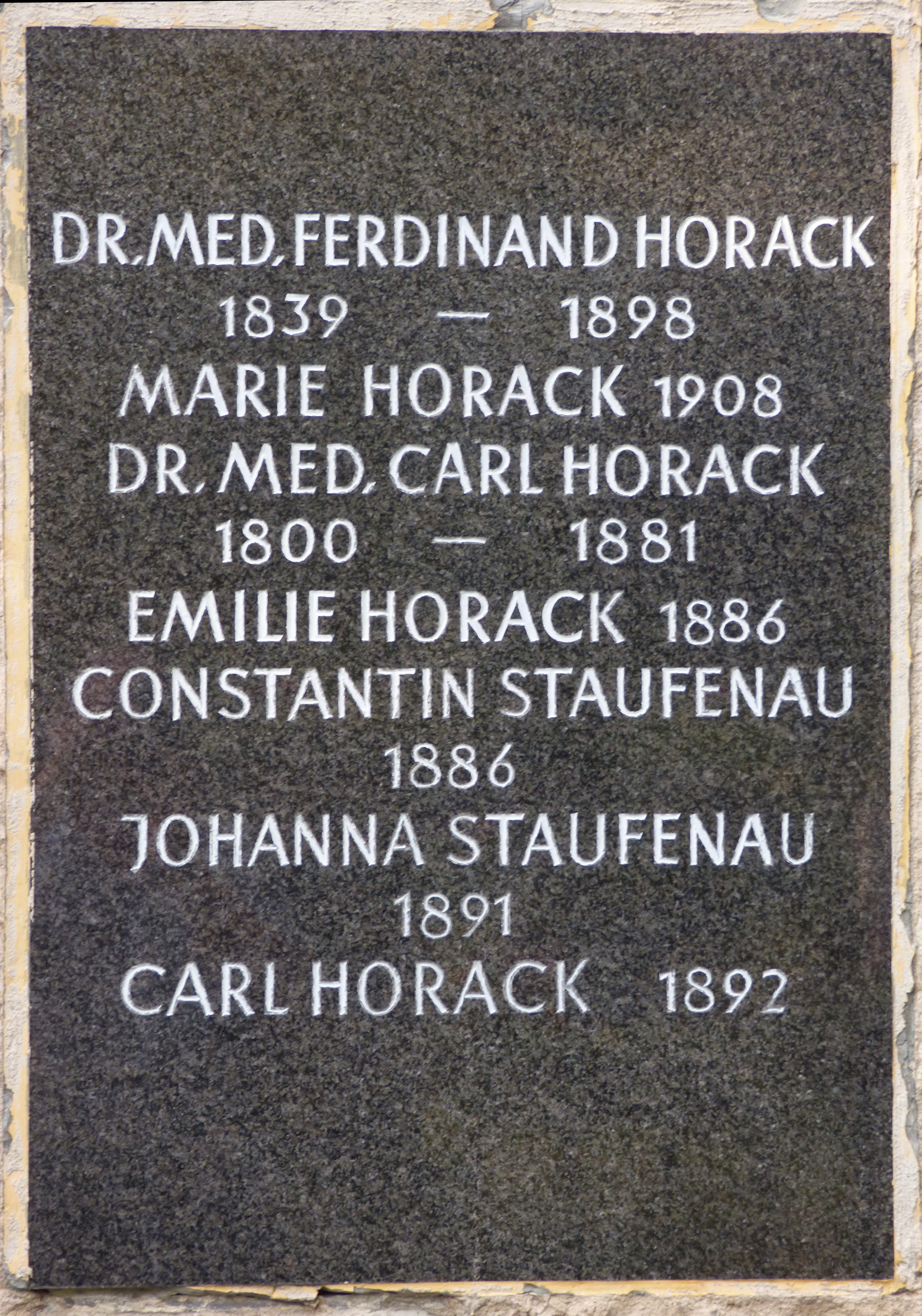 Familiengrabanlage Horack auf dem Dresdner Trinitatisfriedhof.